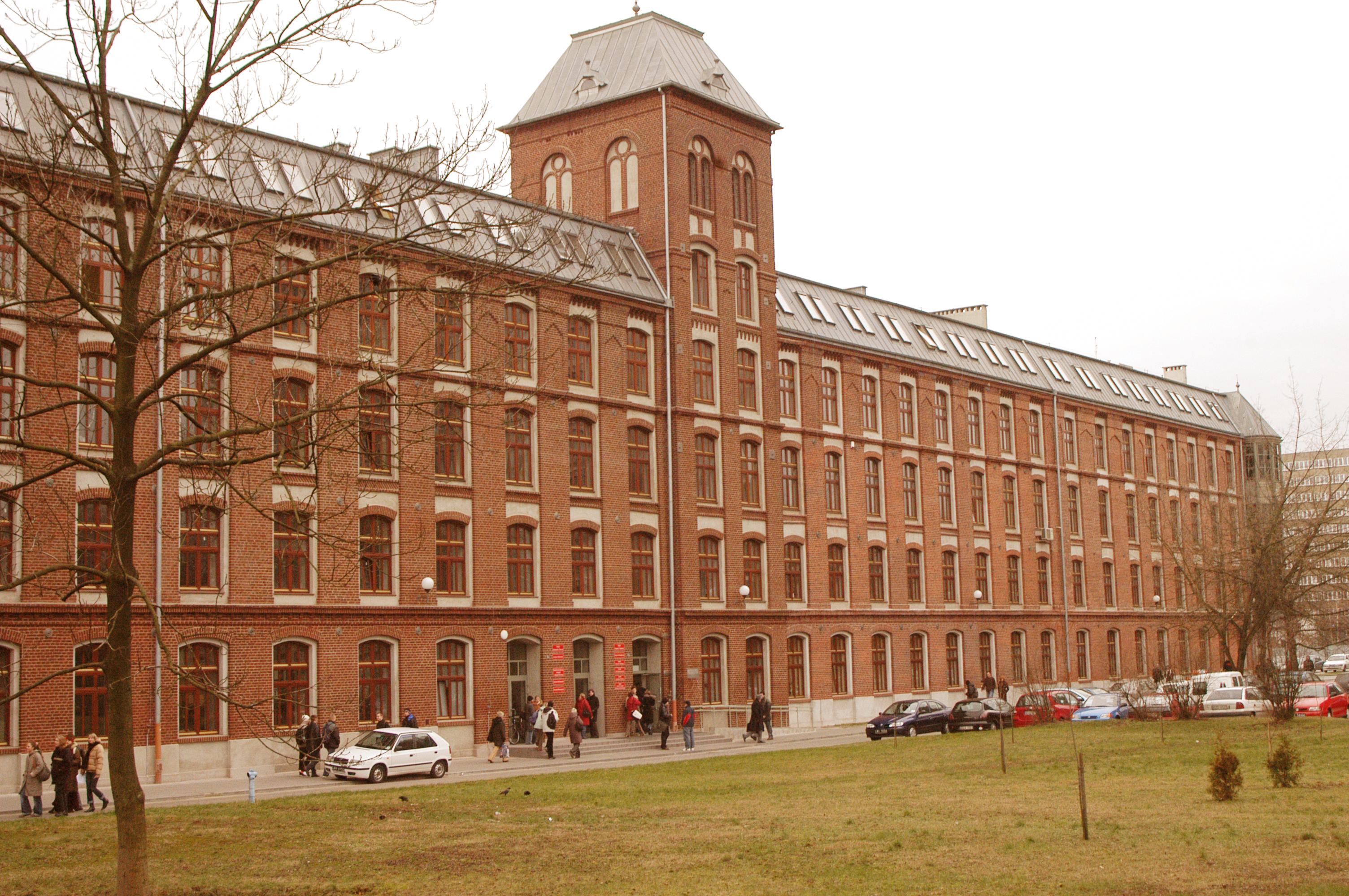 Politechnika Łódzka, Wydział Elektrotechniki, Elektroniki, Informatyki i Automatyki